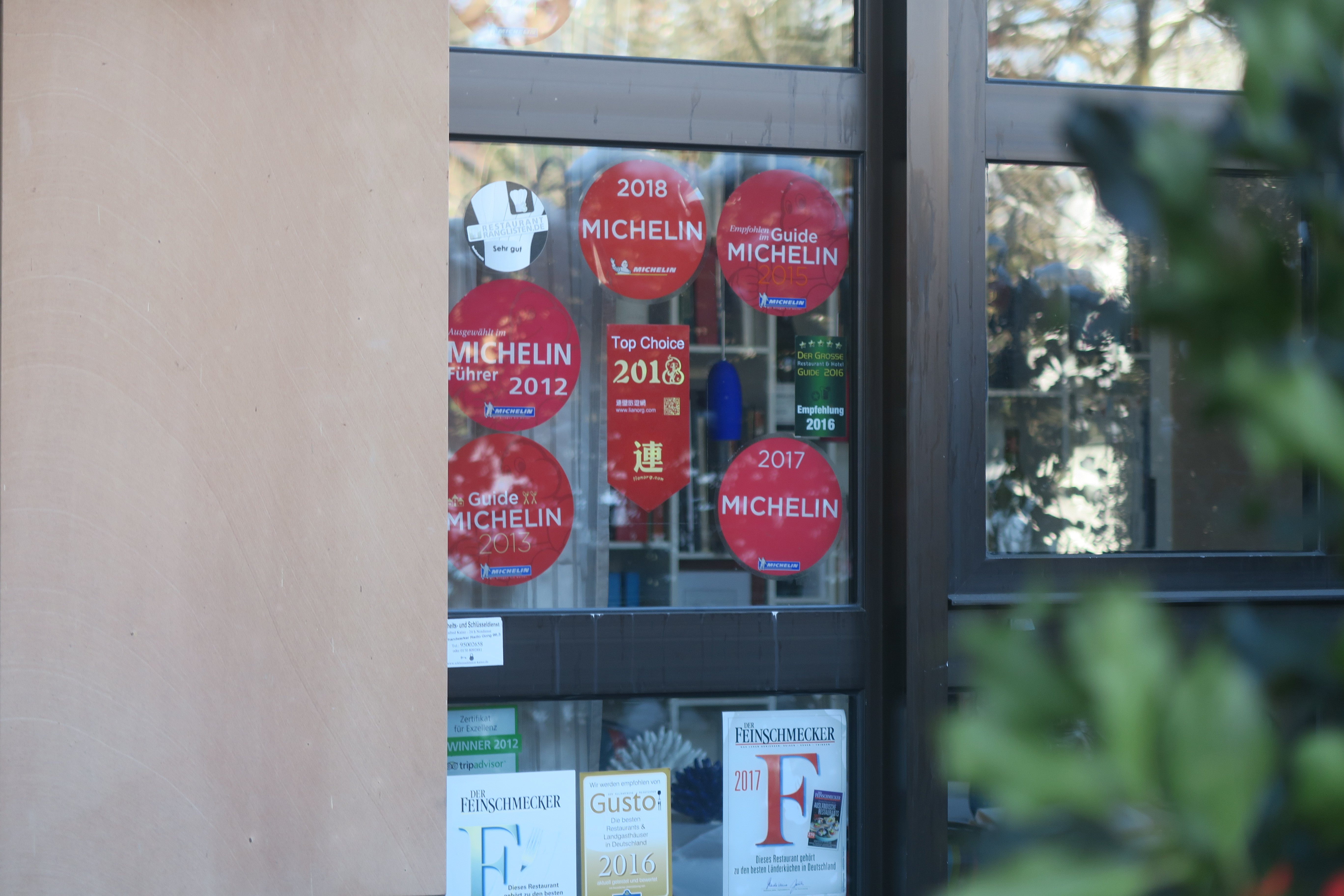 Restaurant Acquarello, München, Mühlbaurstraße 36